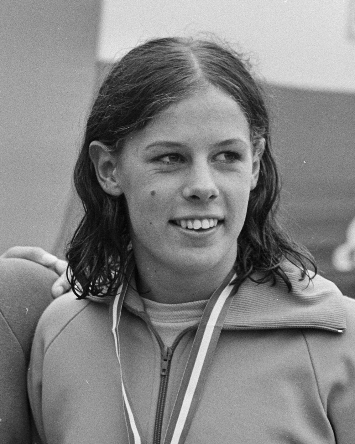 Hella Rentema